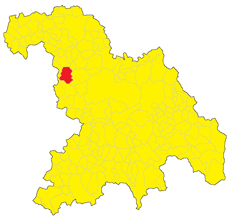 Mappa del comune di Fubine (AL)